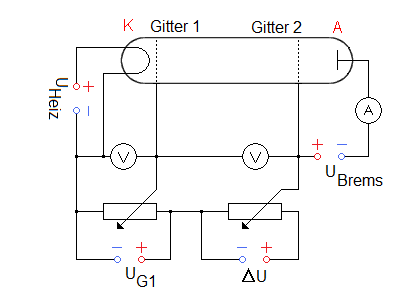 Verbesserte Schaltung mit Feinauflösung